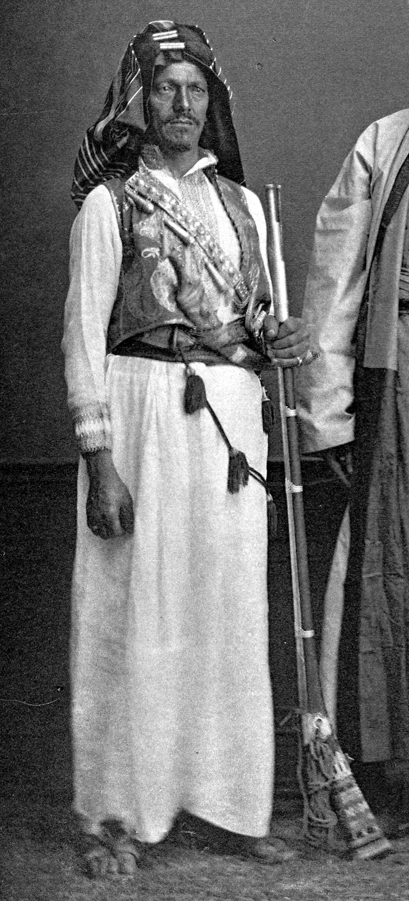 Baveri, member of the guard of the Sharif of Mecca, 1873